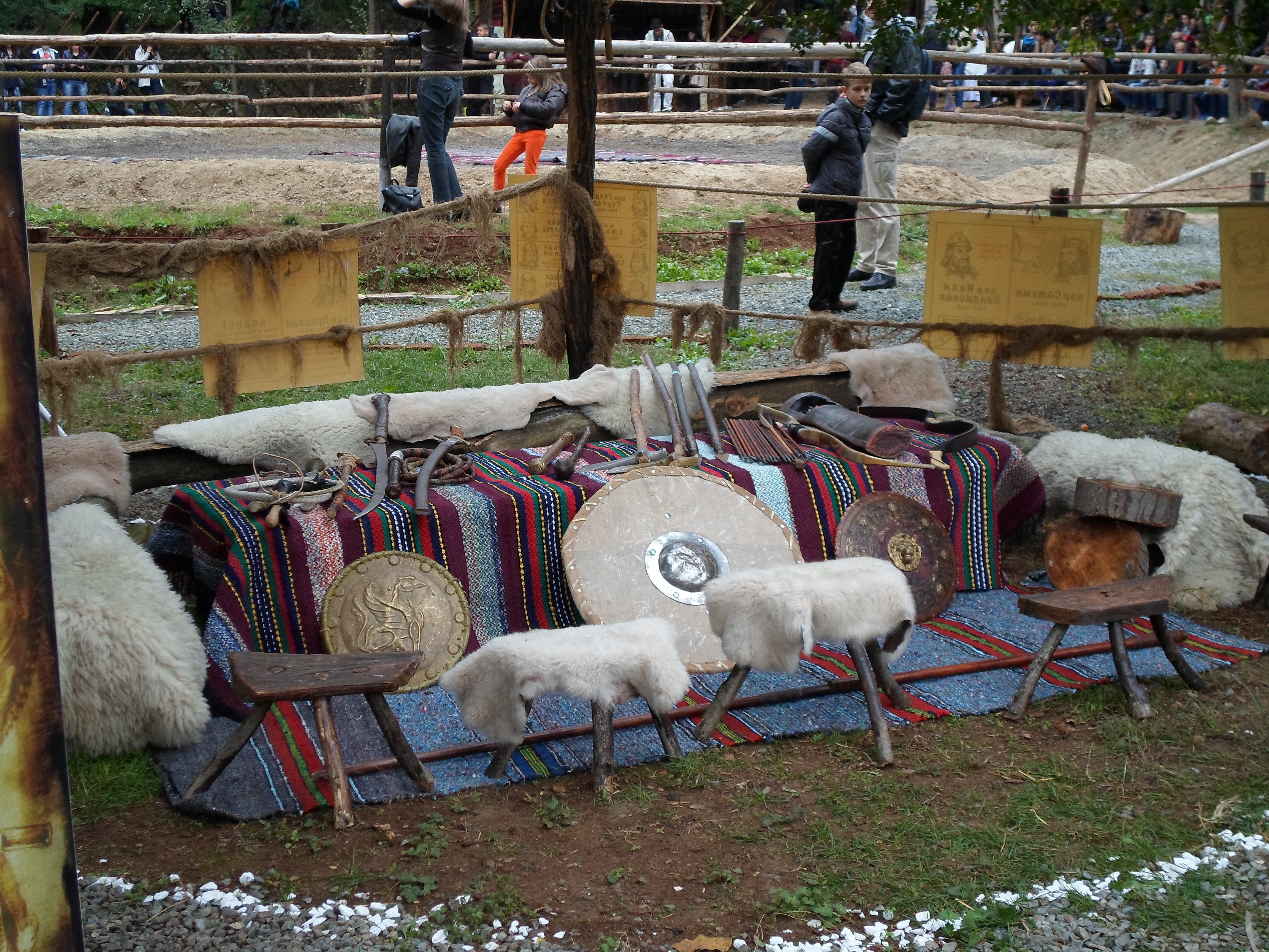 Част от Аул Бага-Тур - Стара Загора от деня на откриване - 18 октомври 2015 г.